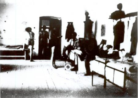 Srpskohrvatski / српскохрватски: Slovenačka soba u logoru Bileća 1940.